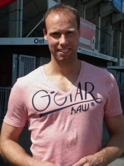 Rene Renno